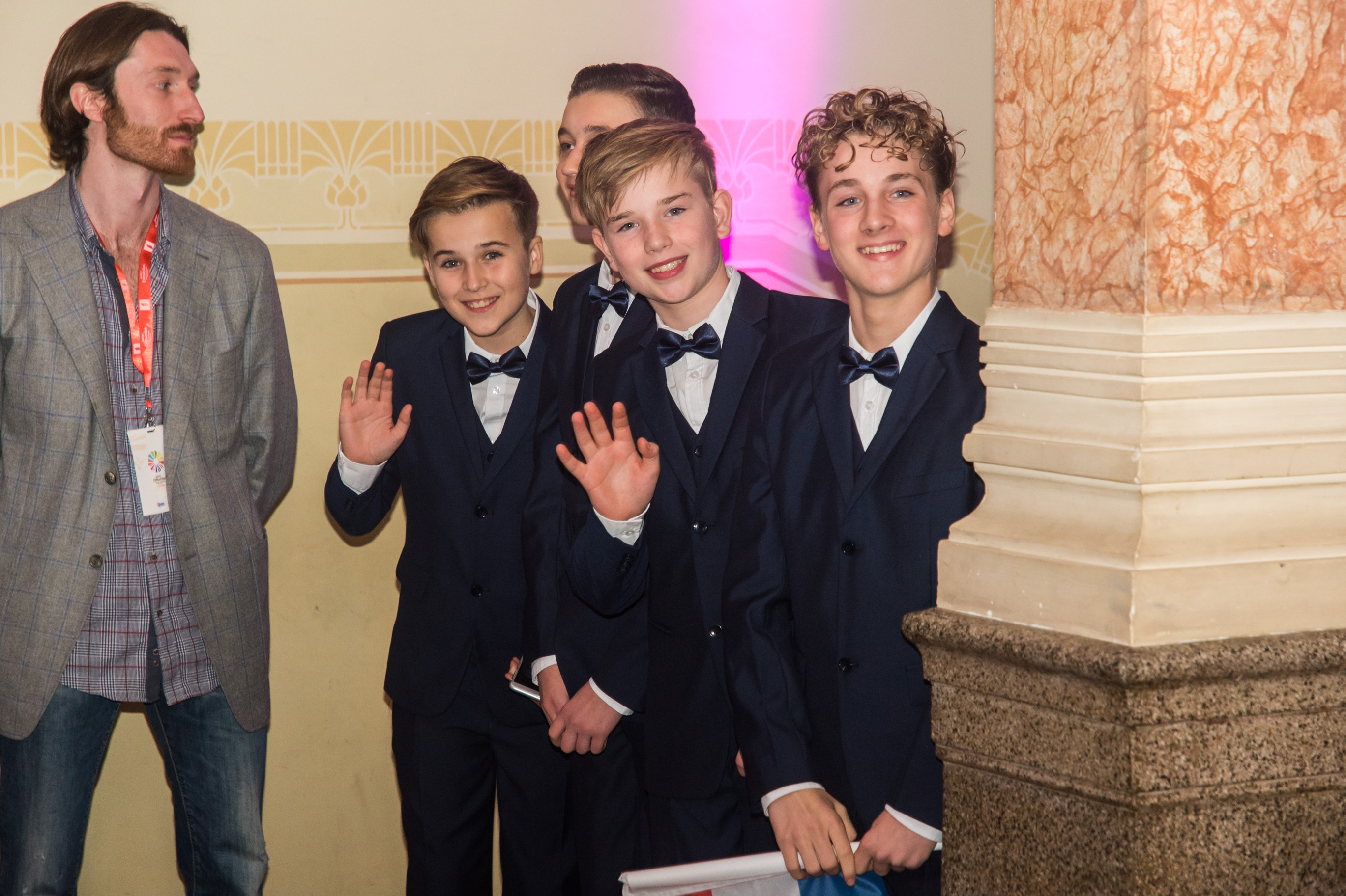 Группа Fource перед выходом на красную ковровую дорожку Детского Евровидиения 2017